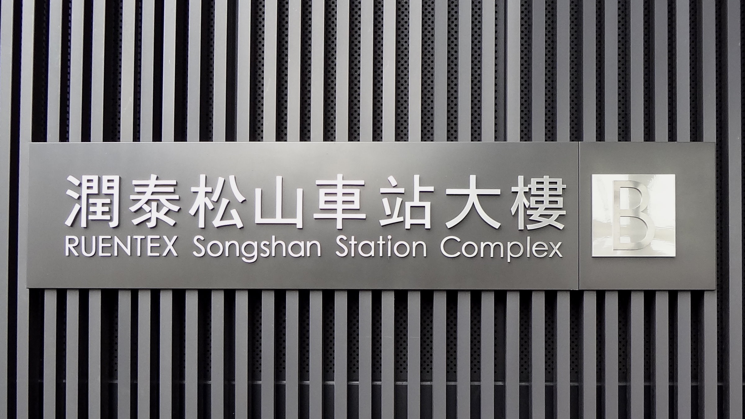 潤泰松山車站大樓B棟鑄字招牌。